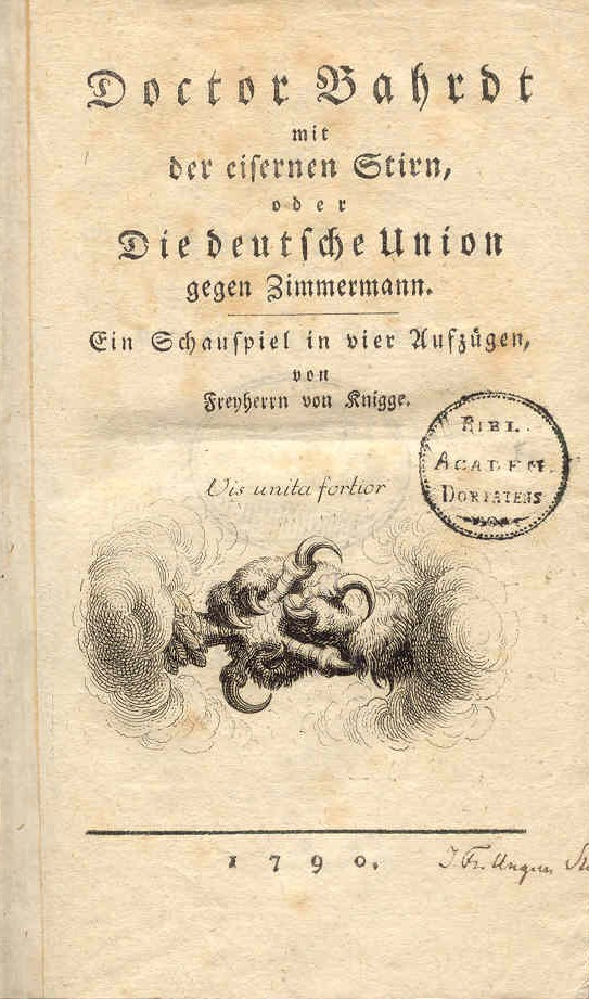 Titelblatt August von Kotzebue: Br. Bahrdt... 1790